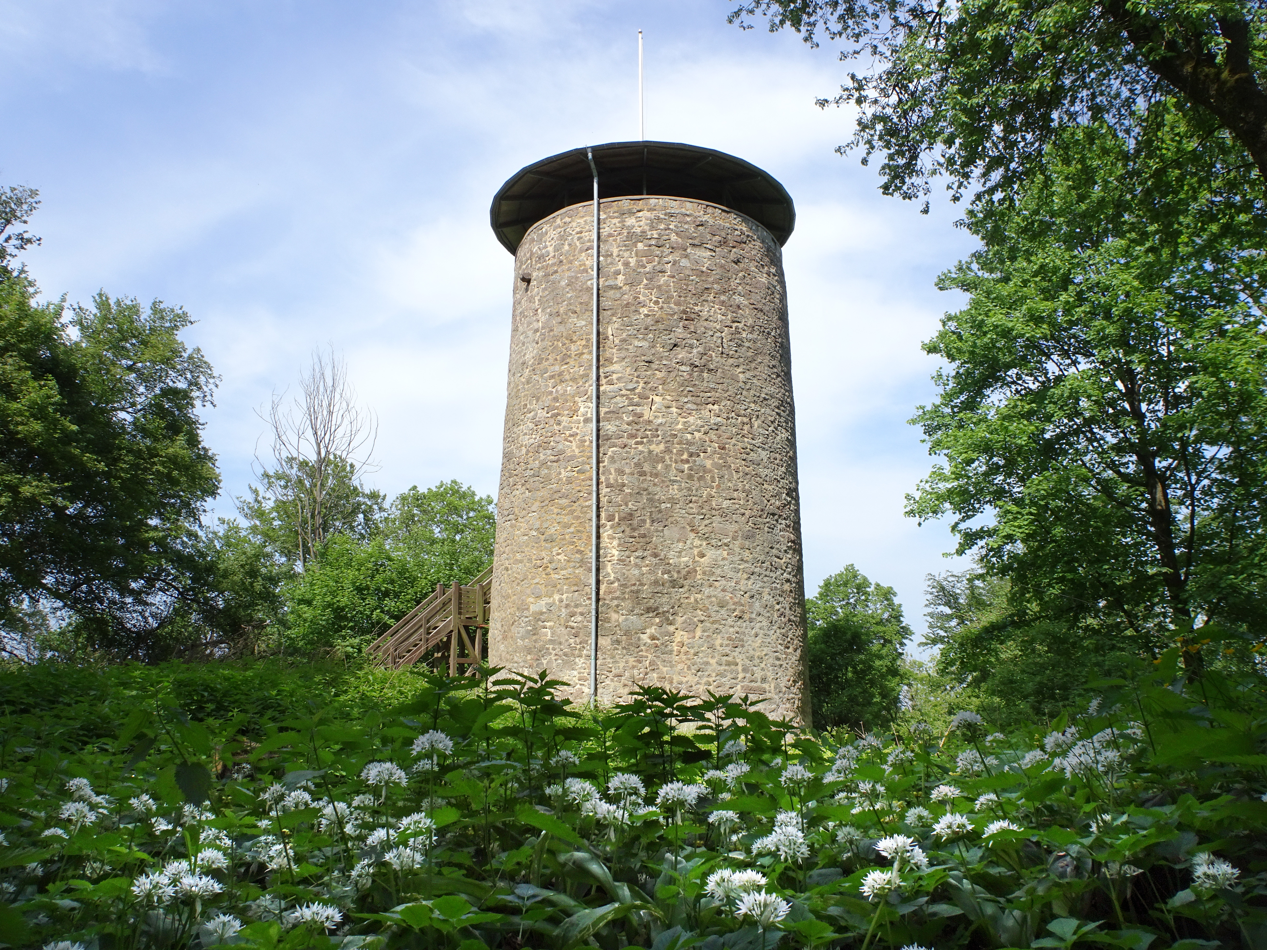 Die ehemalige Burg der Grafen von Reichenbach ist im 16. Jahrhundert verfallen. Von der ehemals umfangreichen Anlage ist noch der, in den Jahren 1899 bis 1901, wiederhergestellte runde Bergfried erhalten. 2008 und 2009 wurde der als Aussichtsturm genutzte Bergfried erneut instandgesetzt und mit dem einem Dach versehen. Die Burgruine liegt in der Gemarkung von Reichenbach, einem Ortsteil der Stadt Hessisch-Lichtenau im nordhessischen Werra-Meißner-Kreis.